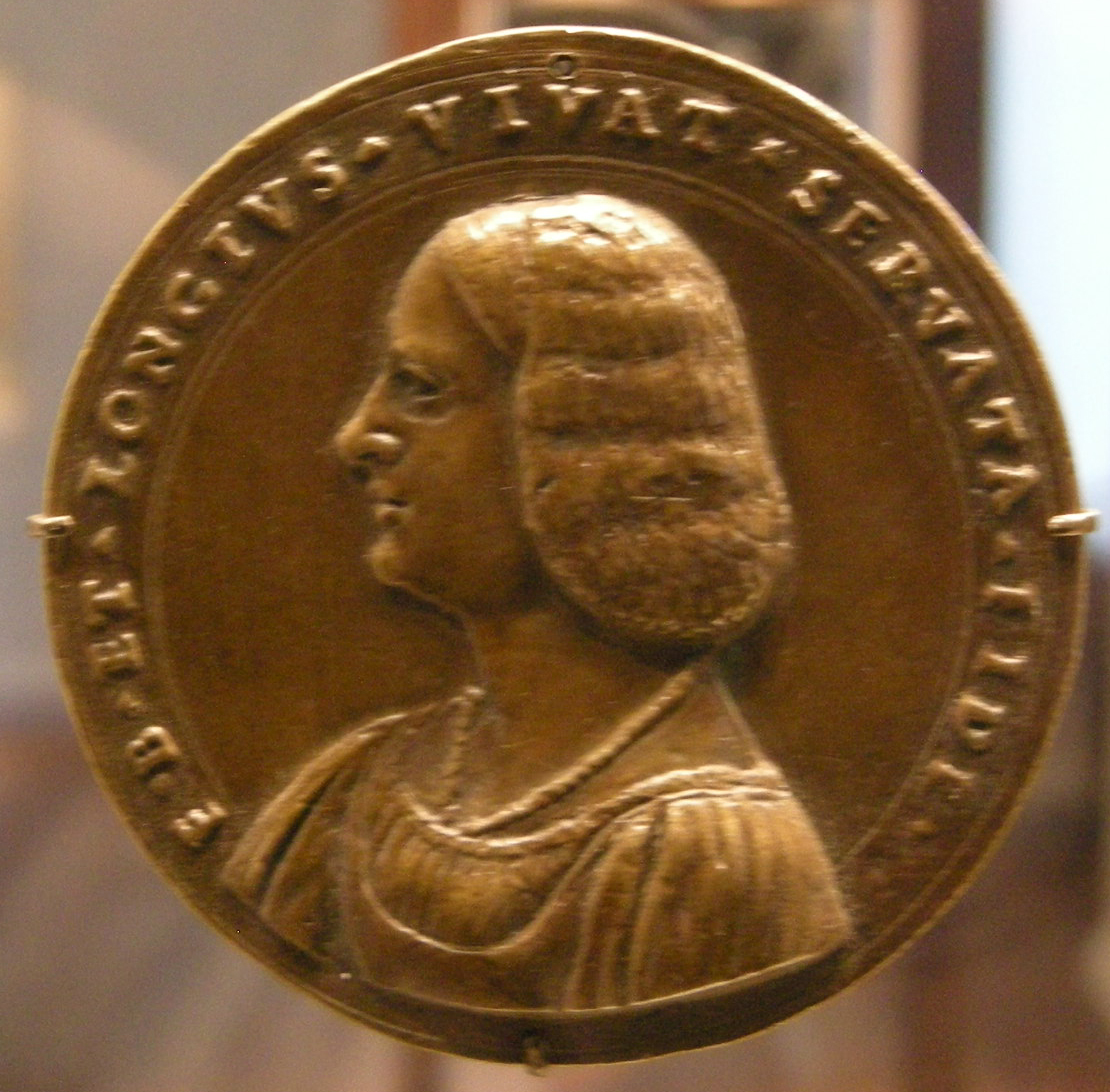 Giovanni maria pomedelli, medaglia di fanciulla ignota, 1500-1530 ca., recto